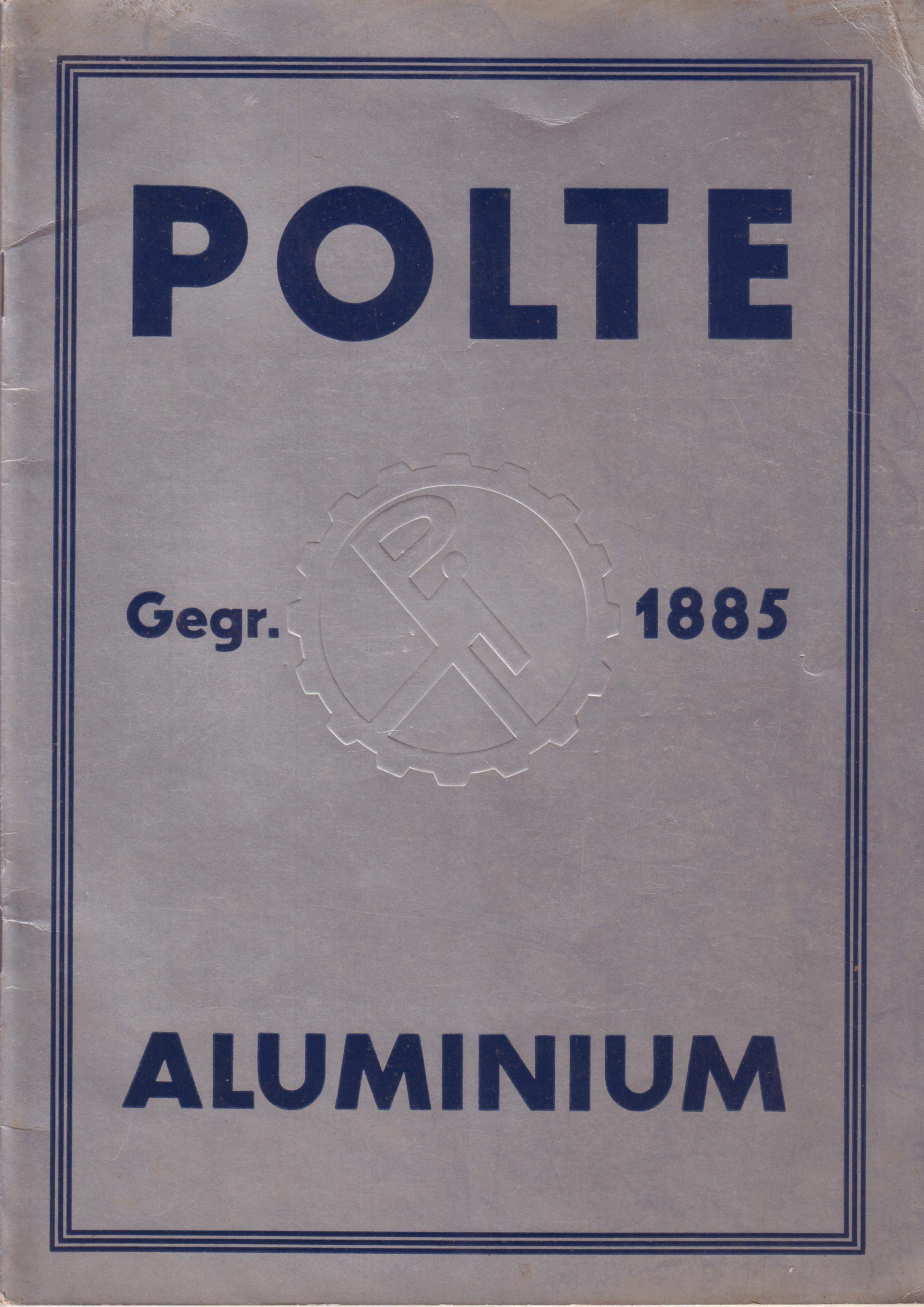 Polte Aluminum products catalogue